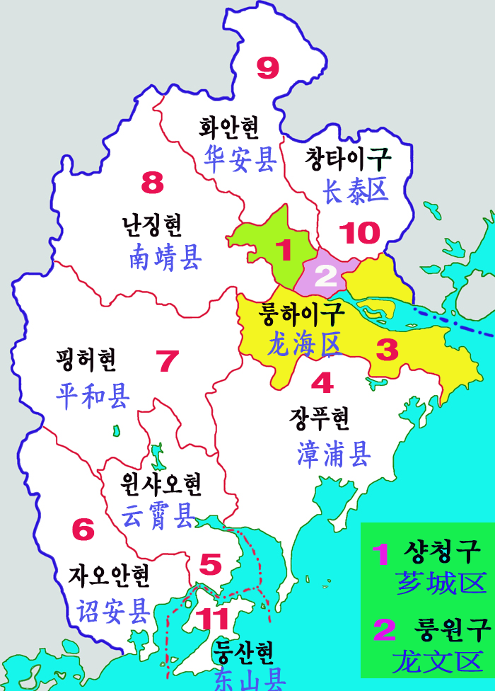 푸젠성 장저우시 현급구역도